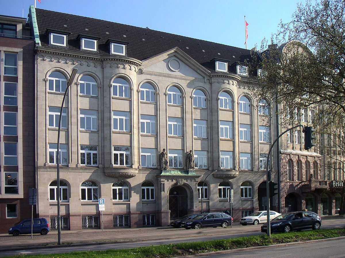 Hamburg, Kontorhaus Besenbinderhof 52, ehemalige Verwaltung der Großeinkaufs-Gesellschaft Deutscher Consumvereine m.b.H. (GEG)